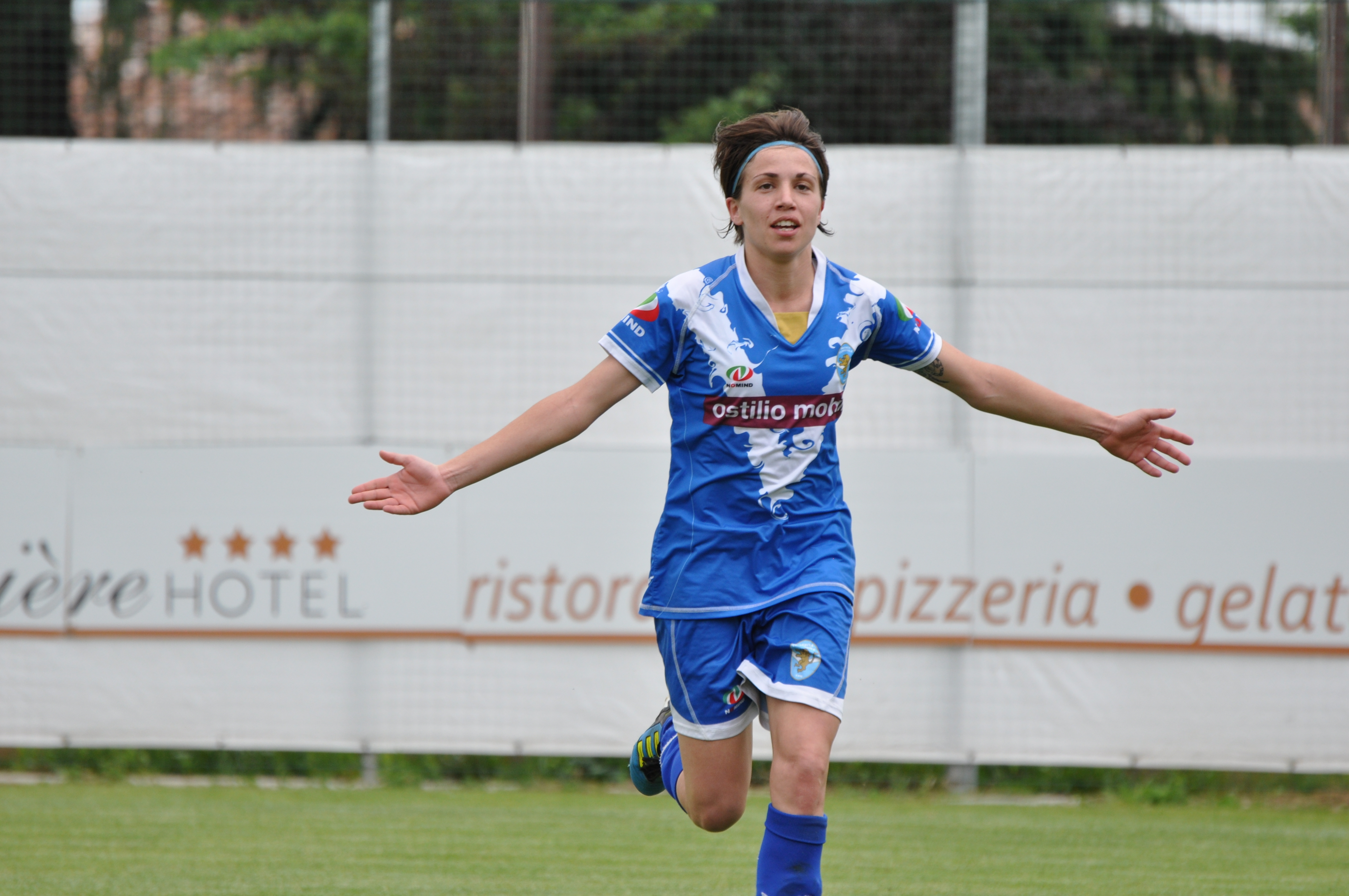 Daniela Sabatino, esultanza.